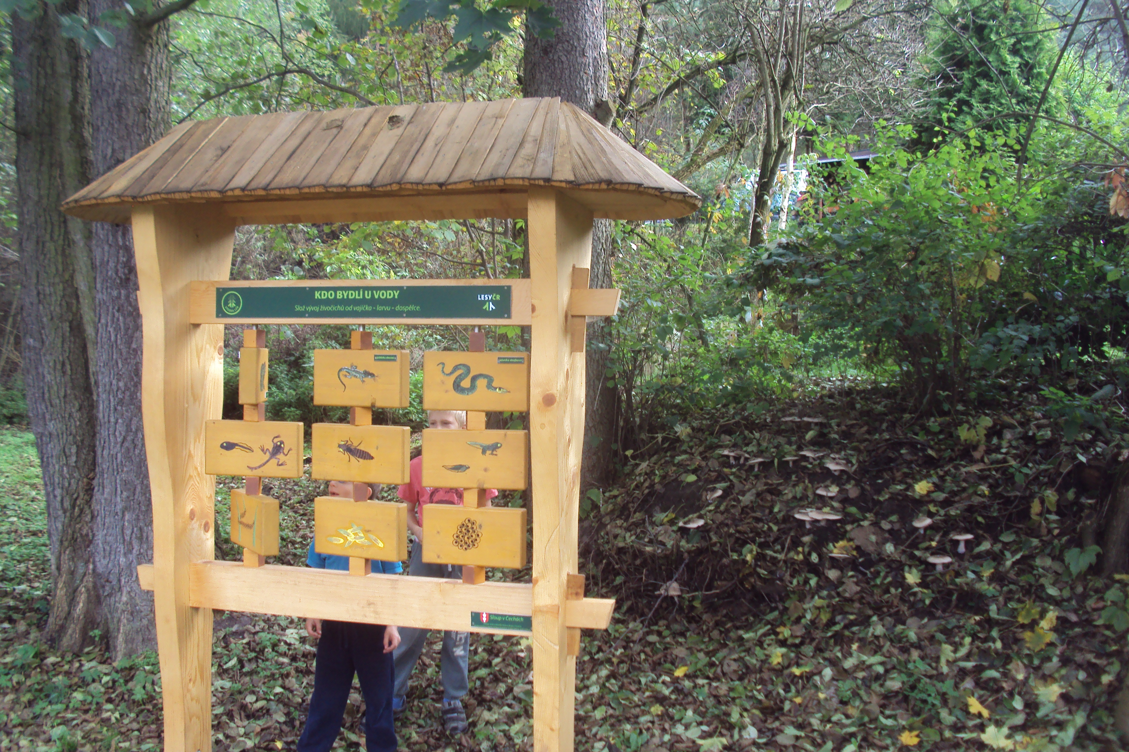 Zastavení na trase stezky